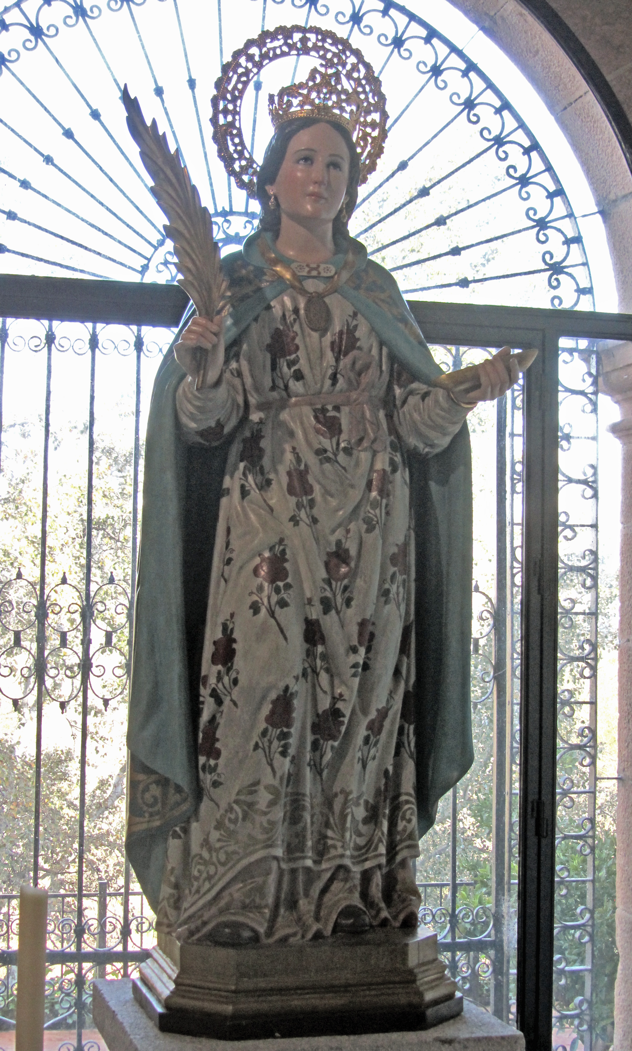 Imagen de Santa Potenciana, patrona de Villanueva de la Reina (Jaén) España. Se encuentra en la iglesia parroquial de La Natividad de dicha población.